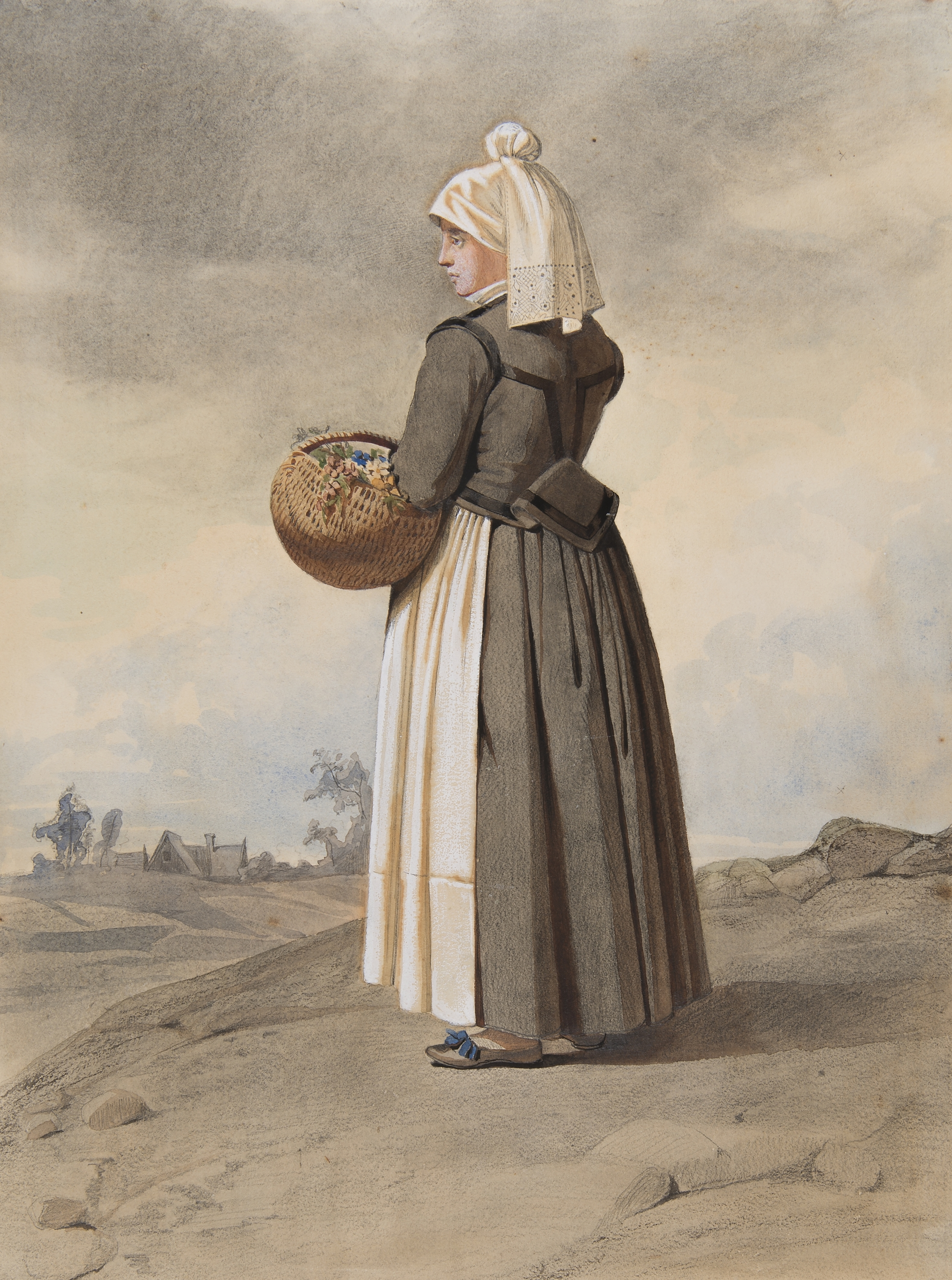 Dräkt. Kvinna i dräkt i helfigur snett bakifrån i landskap. Kvinnan har en blomsterkorg på armen. Akvarell i storformat av Otto Wallgren. Depicted place: Q3591357 (Q3591357) (Härad), Sweden (Q34) (Land), Scania (Q180756) (Landskap)